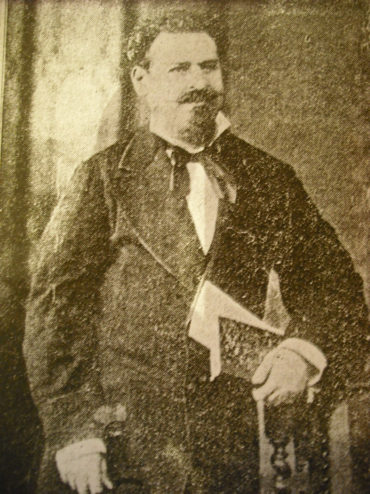 Foto del escritor Pedro Castera que ilustra el artículo de Gonzalo Peña Troncoso, “Pedro Castera, autor de la novela Carmen”, en Revista de Oriente, núm. 11, abril de 1934, pp. 5,30-31. No hay referencia del autor de la fotografía o del archivo al que perteneció.